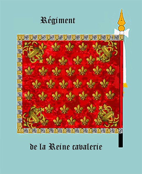 Standarte des Kavallerieregiments „la Reine“ Königreich Frankreich (Rückseite)